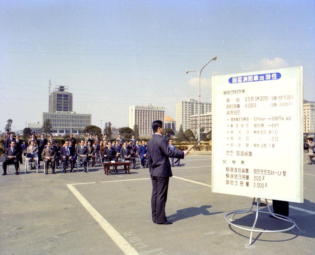 최초 국산소방차 인수식(The First Domestic-made Fire Trucks Ceremony)이 1977년 3월 28일 여의도광장에서 거행되었다. 김치열 내무부 장관을 비롯한 관계자들이 참석한 자리에서 소방차 36대, 화학차 6대에대한 성능시험이 있었다. 내무부에서 소방차의 부족과 장비의 근대화를 달성하기 위하여 1976년 9월 우리나라 최초로 48대의 국산 소방차를 하동환 자동차 공업주식회사에 발주한 것이 결실을 맺은 것이다. 그때까지 각종 소방차량을 외국에만 의존해 오던 것을 국산화 소방차로 대체하게된 계기가 되었다.